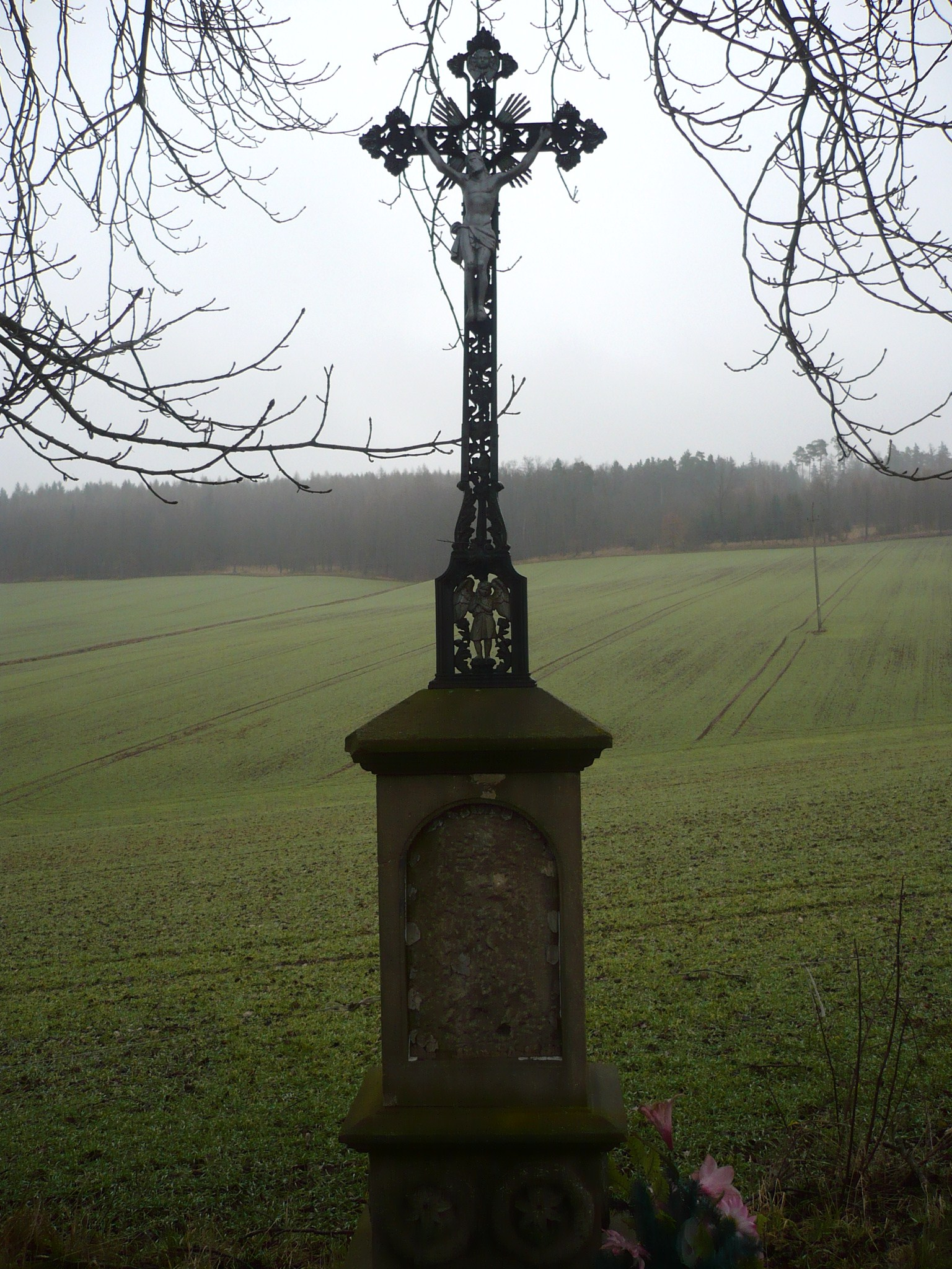 Raszków. Krzyż